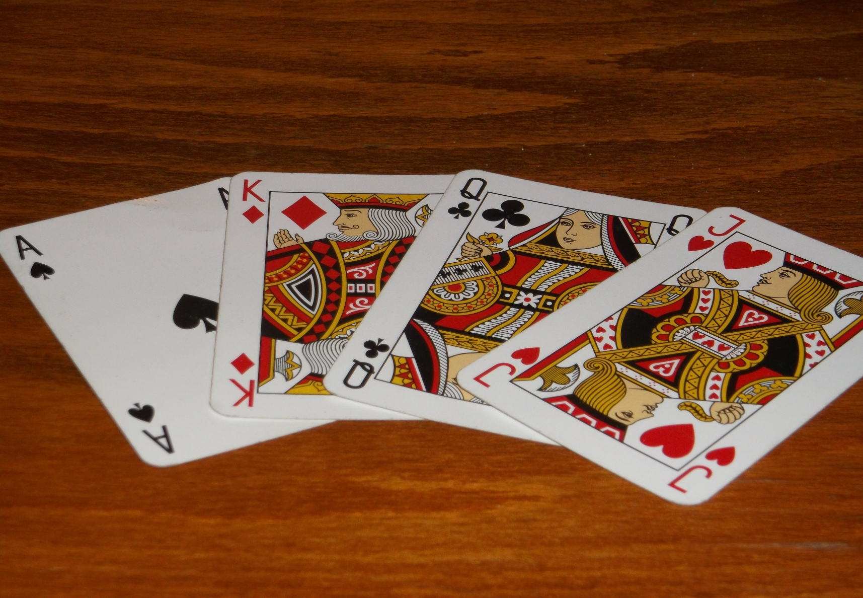 Karty do gry . Playing card